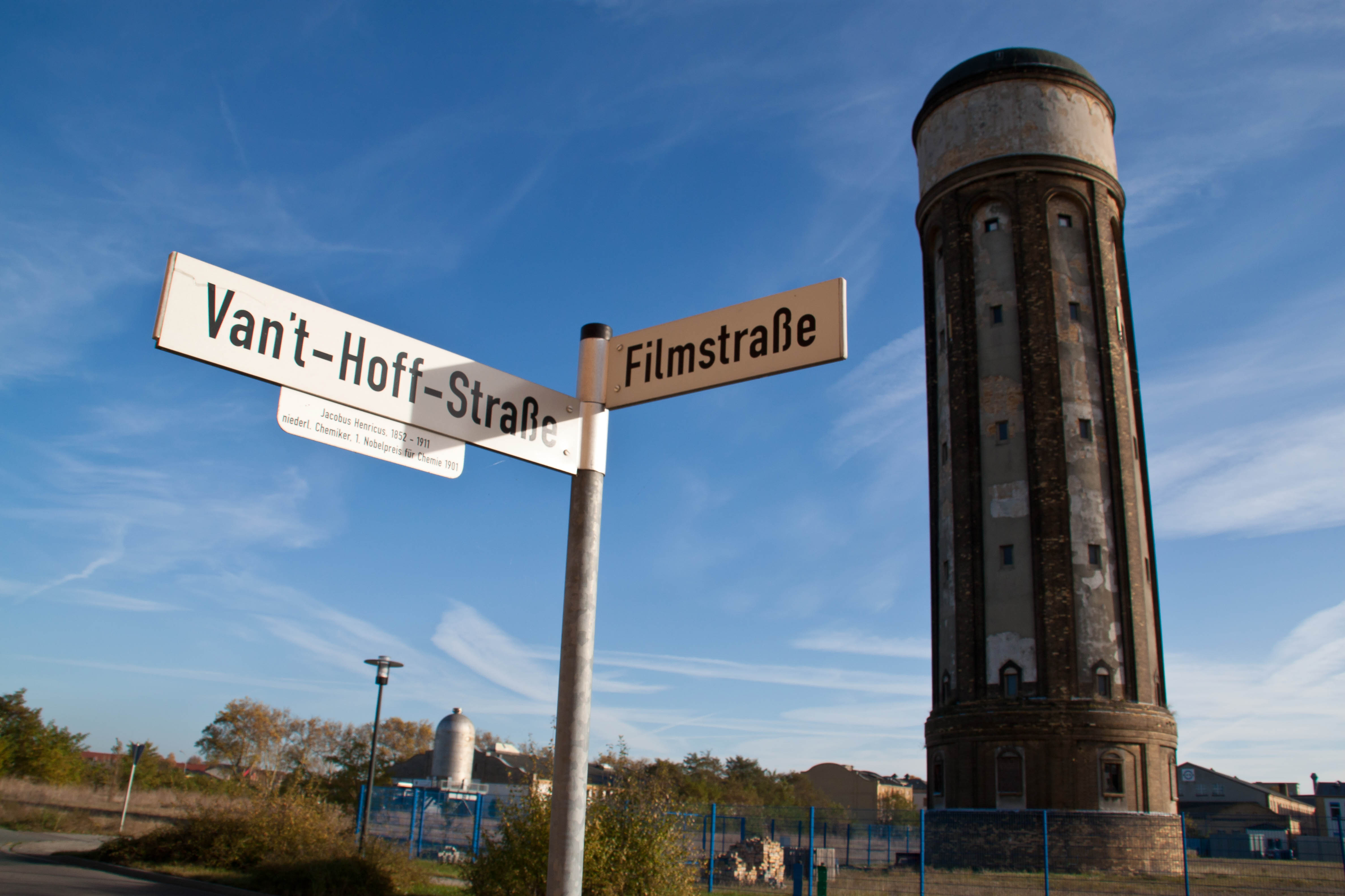 Der Wasserturm der Filmfabrik Wolfen 2014